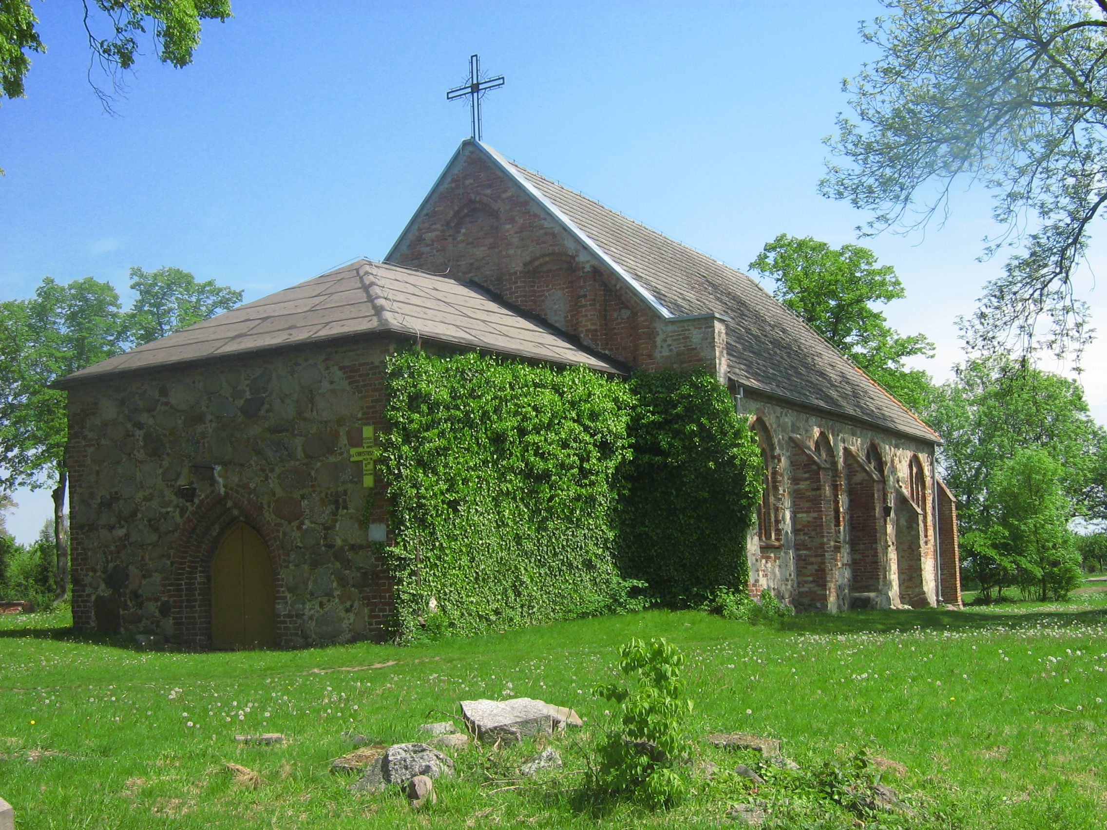 Kościół filialny p.w. Chrystusa Króla w Sibinie.